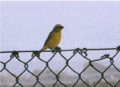 Serinus flaviventris